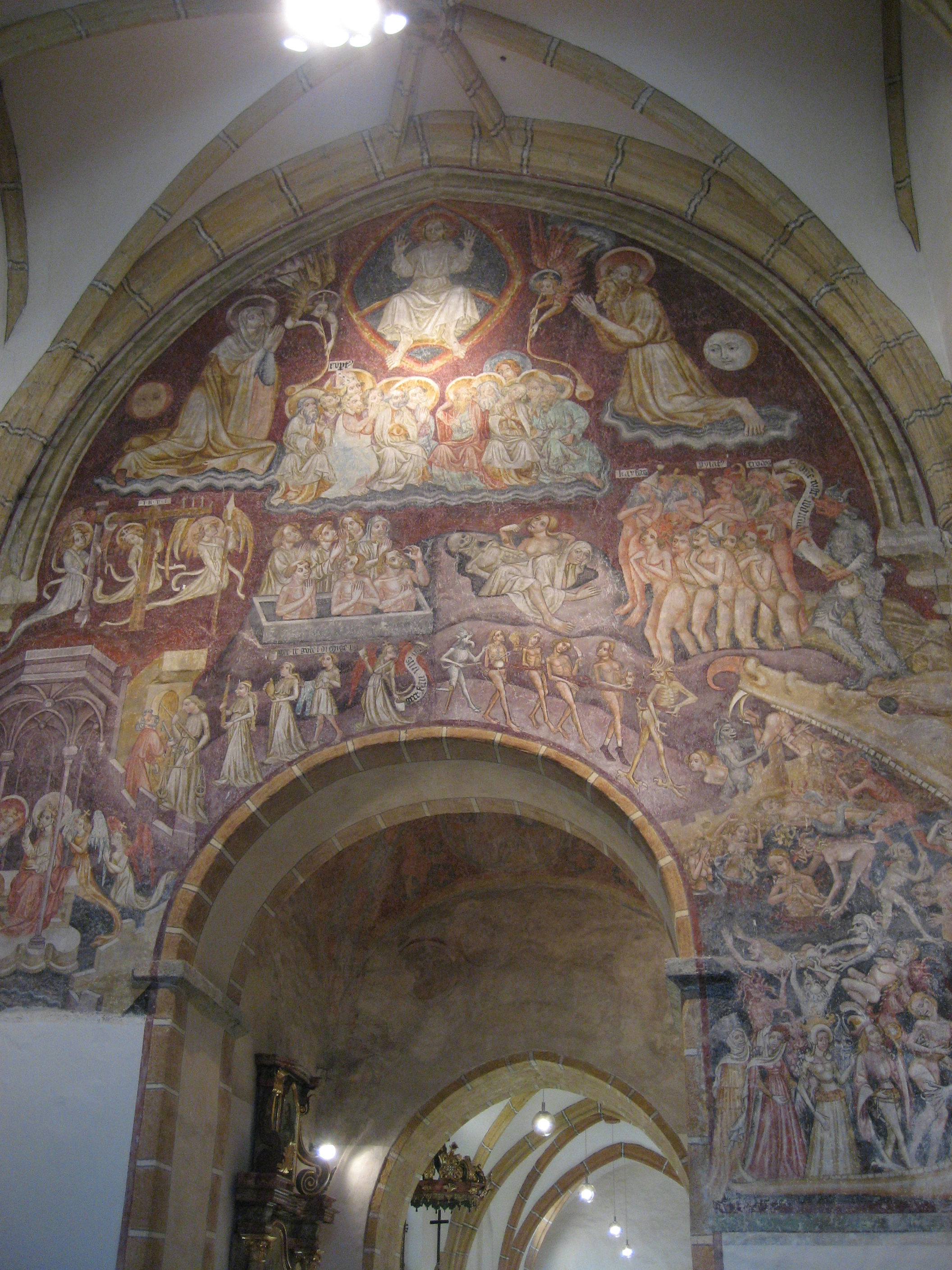 St.Ruprecht in Bruck an der Mur (Austria), gotische Fresken